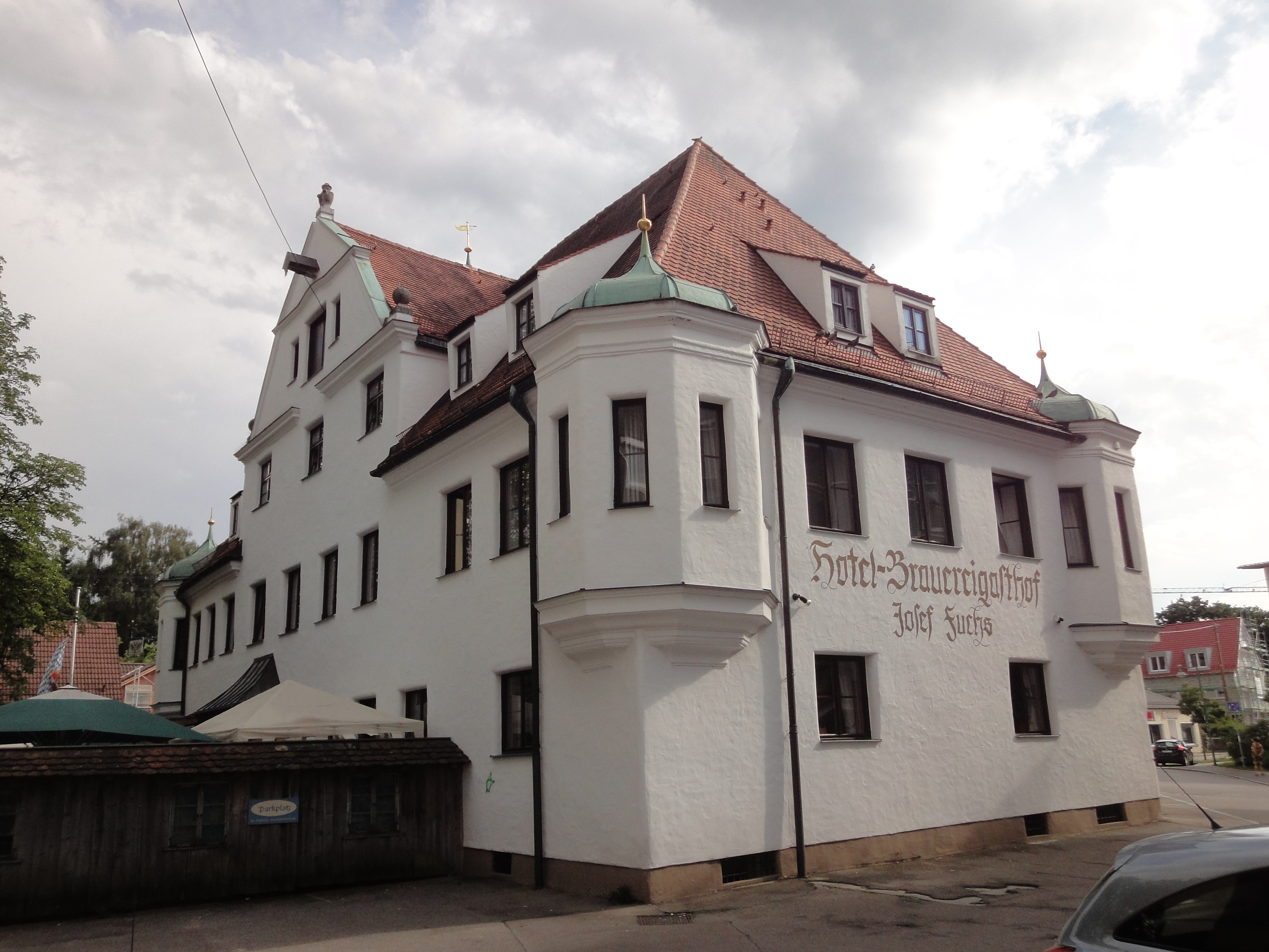 Gasthof in Neusäß-Steppach, zweigeschossiger, hakenförmiger Bau mit Walmdach, polygonalen Eckerkern und Zwerchhaus mit Krankbalken, 1783, der Nordostteil im Kern wohl 1. Viertel 17. Jahrhundert, 1958 und später modernisiert.Baudenkmal Bayern D-7-72-184-15